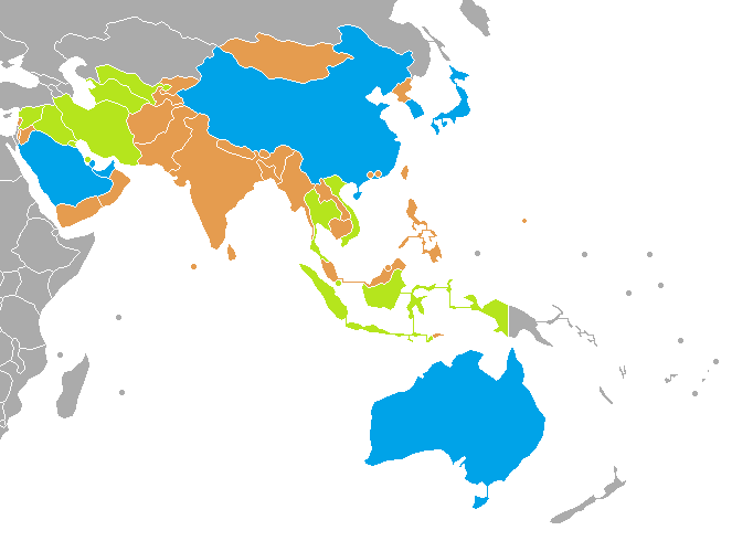 AFC 챔피언스리그 본선 참가경험국과 우승경험국 에서 수정